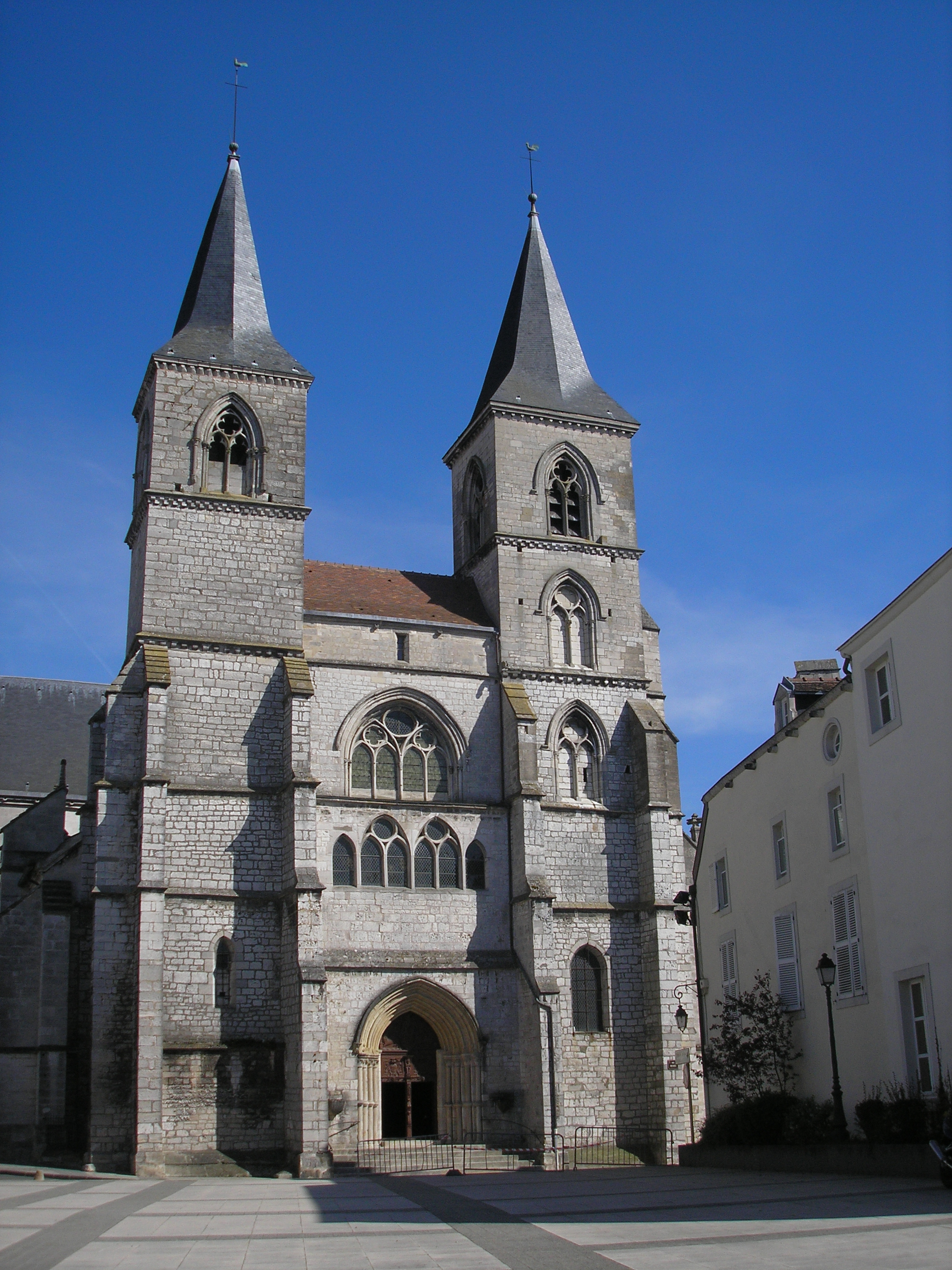 Basilique Saint-Jean-Baptiste de Chaumont (Haute-Marne)